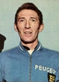 Roger Pingeon (1971), 'Sprint 71'Panini figurina n°76.